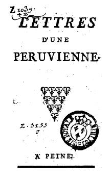 front page from 1st edition Lettres d'une Peruvienne (1747)